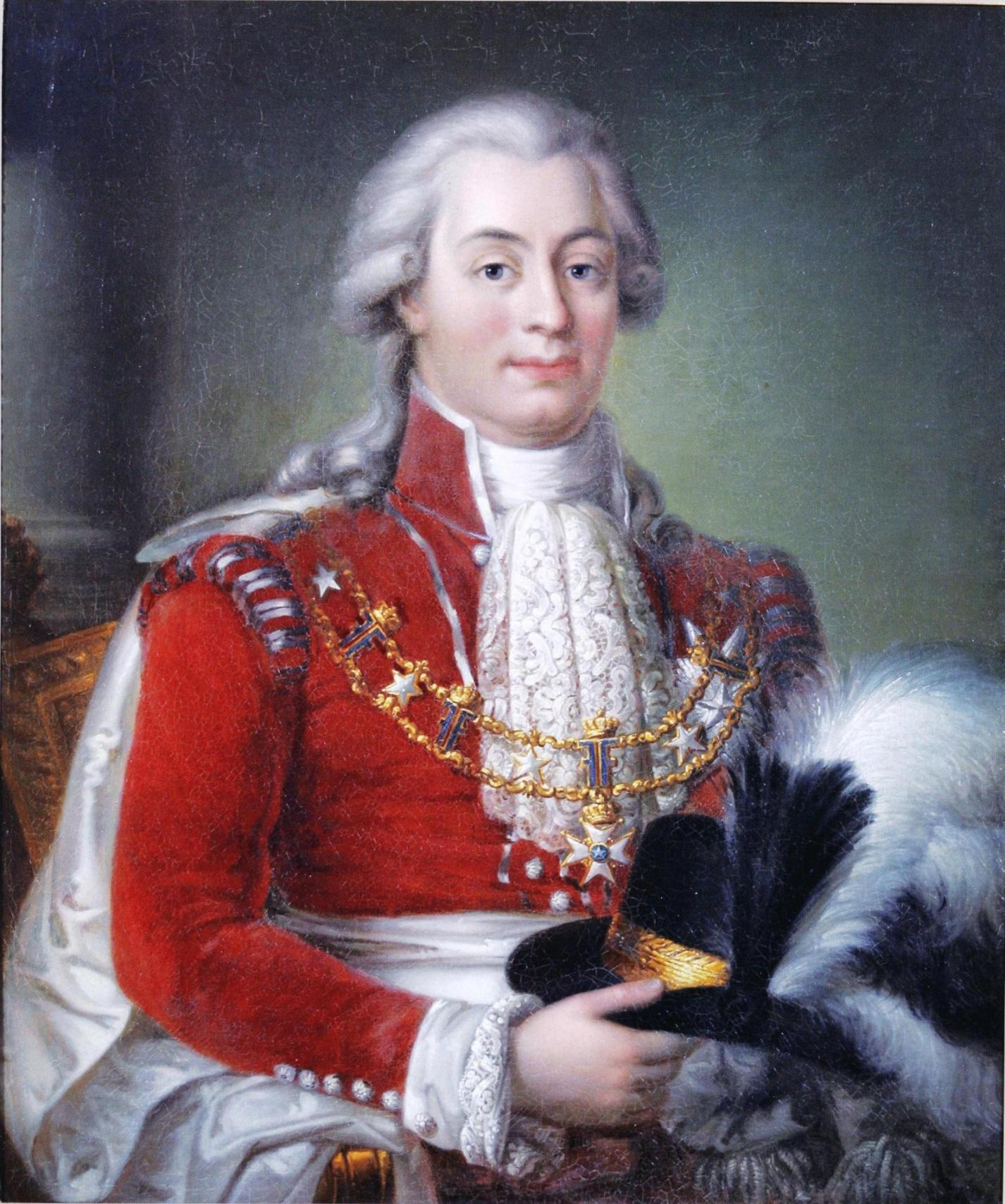 Vaasan hovioikeuden presidentti Axel Christian Reuterholm (1753–1811) vaimonsa Charlotta Malm-Reuterholmin maalaamassa muotokuvassa ilmeisesti 1700-luvun lopulta. Maalaus saattaa olla kopio jonkun toisen taiteilijan aiemmasta muotokuvasta. Maalauksen omistaa Vaasan hovioikeus.